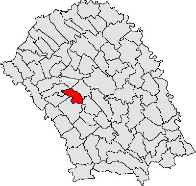 Categorie:Hărţi ale judeţului Botoşani